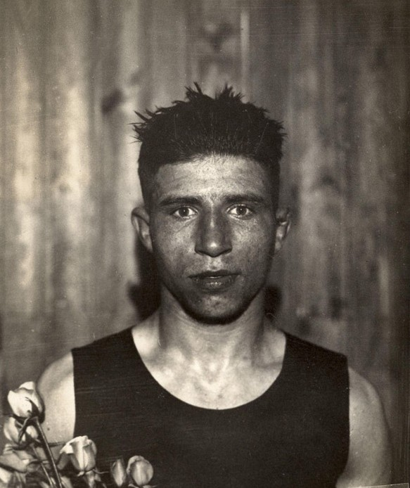 Spaarnestad Photo/SFA003000894 Boksen. Lambertus "Bep" van Klaveren, vedergewicht tot 57,152 kg. Goud op de Olympische Spelen 1928 Amsterdam.